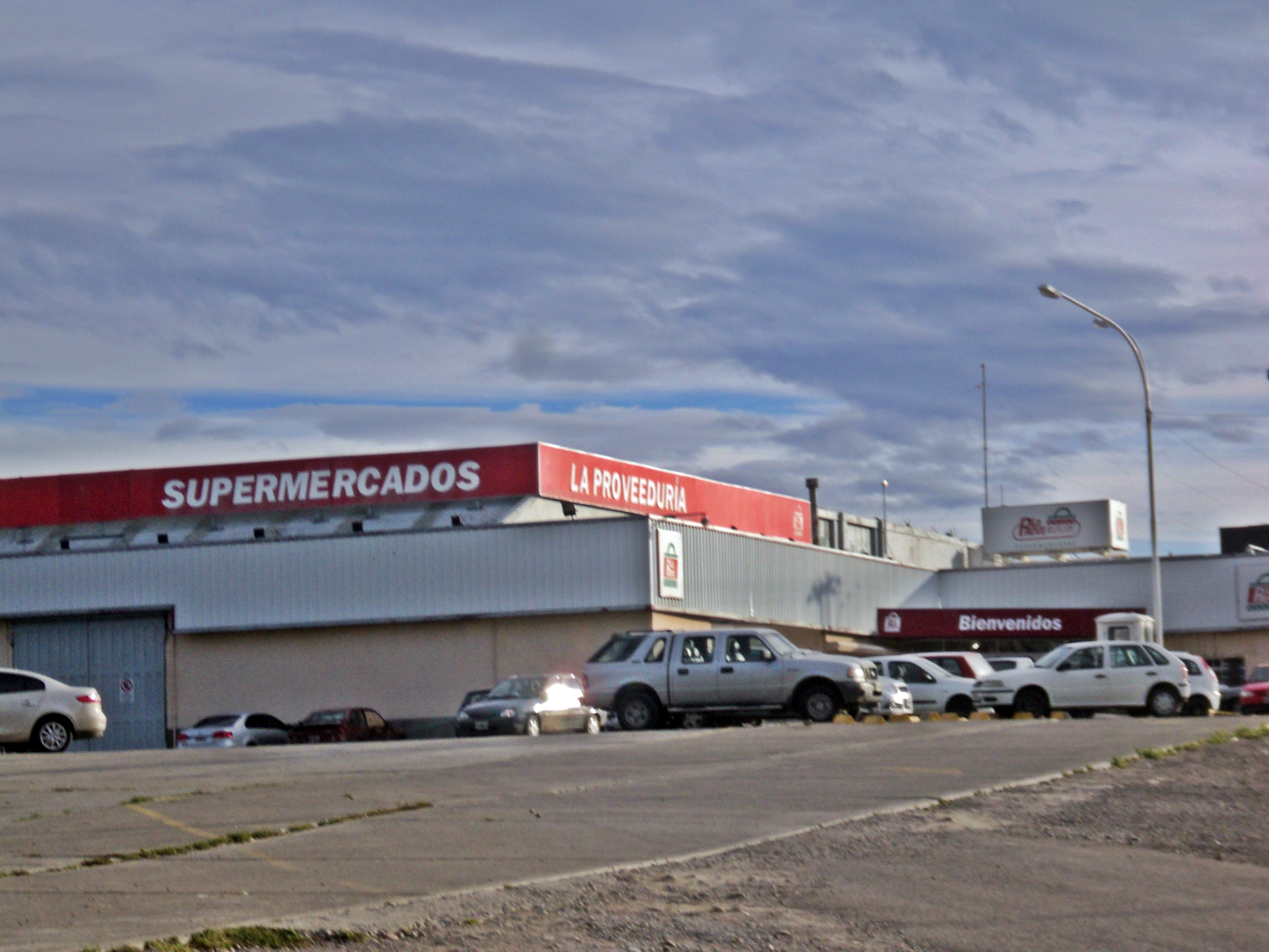 El principla supermercado de la Provee en el barrio centro